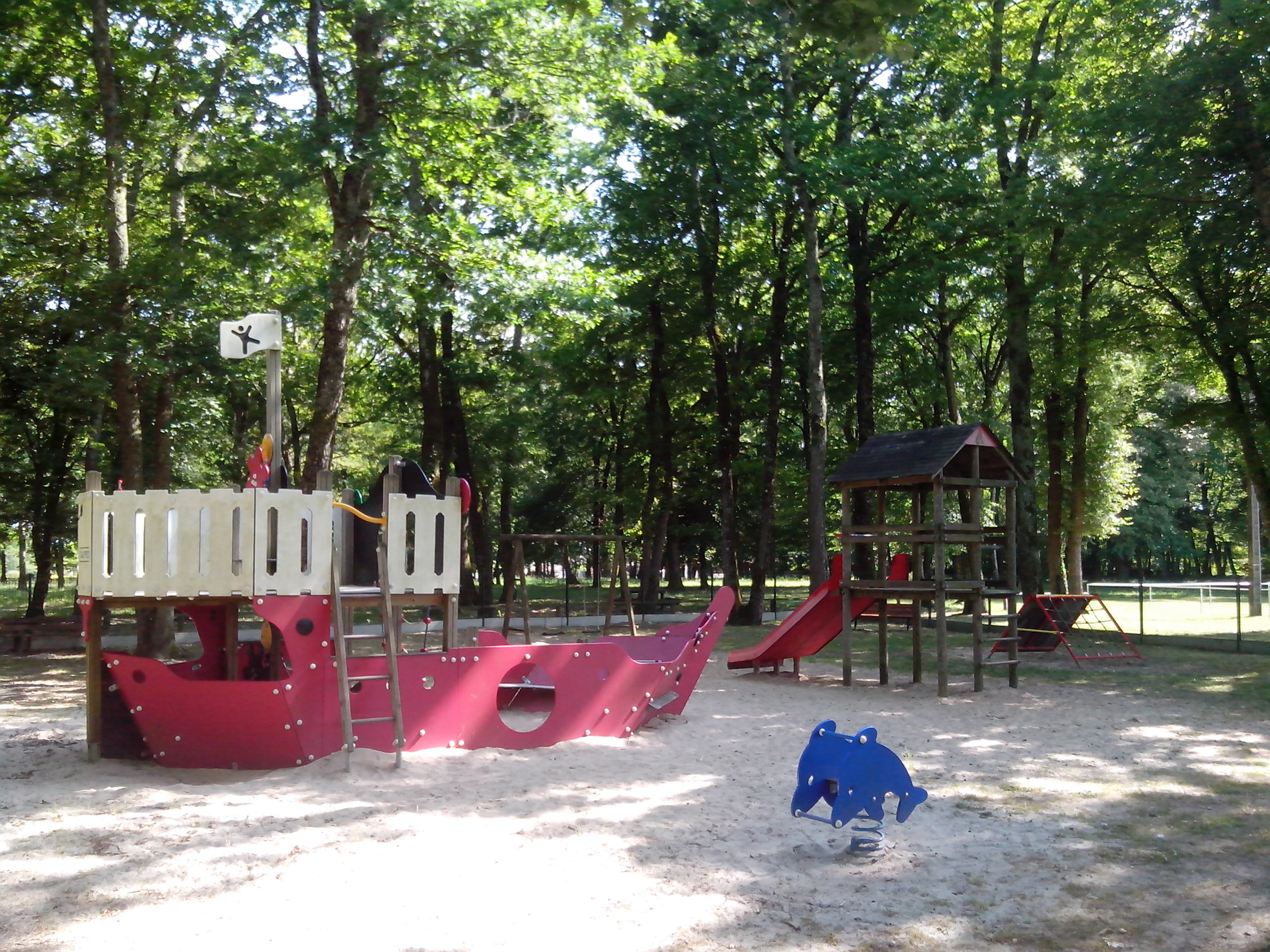 L'aire de loisirs communale de Breuillet